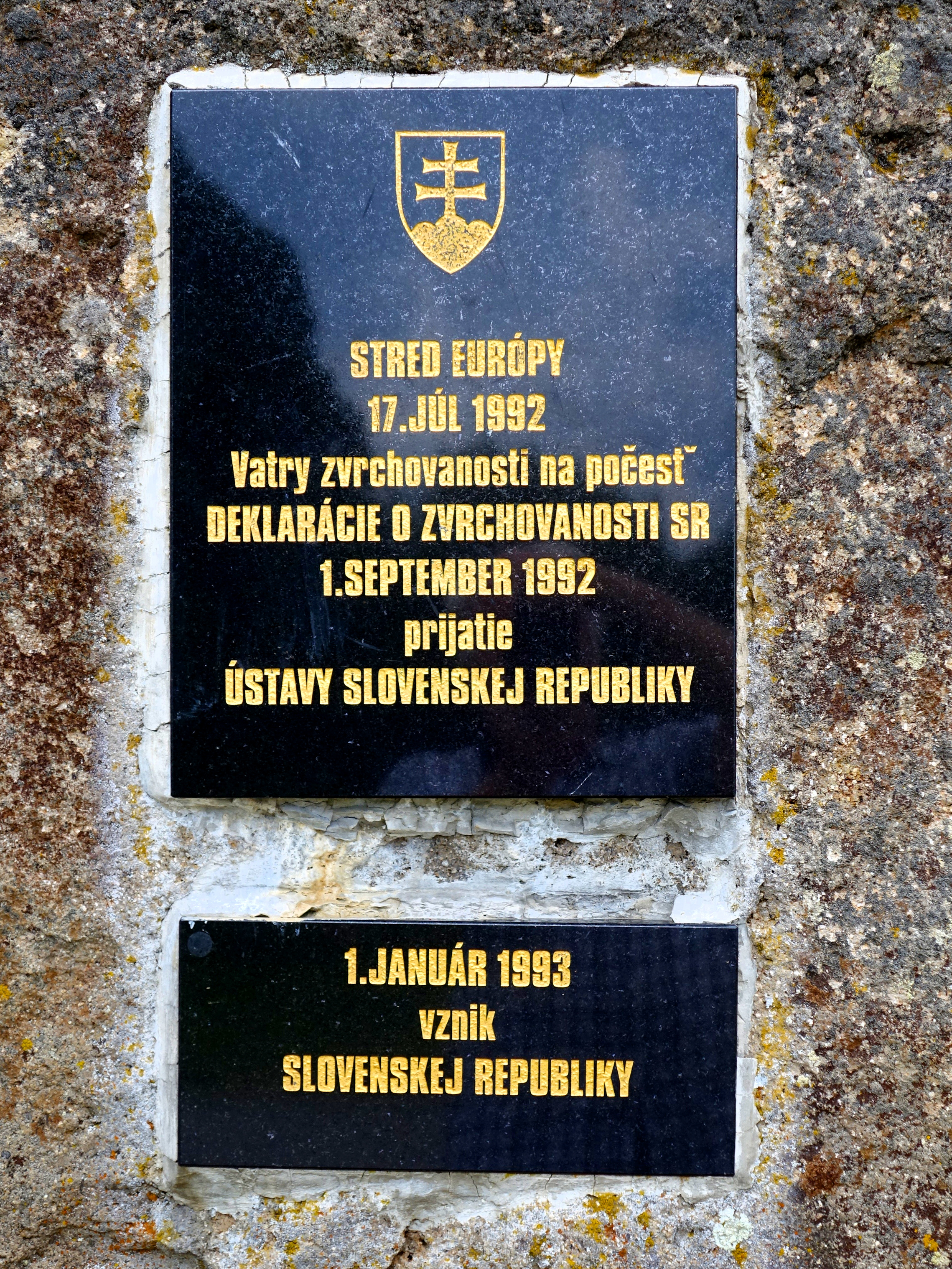 Pamätný kameň, detail tabule. Leto 2019. Prvý geografický stred Európy vypočítali v roku 1872 talianski inžinieri, mal by sa nachádzať priamo pod vežou v kostole svätého Jána Krstiteľa. Okolie kostola. Obec Kremnické Bane. Okres Žiar nad Hronom.Slovensko.